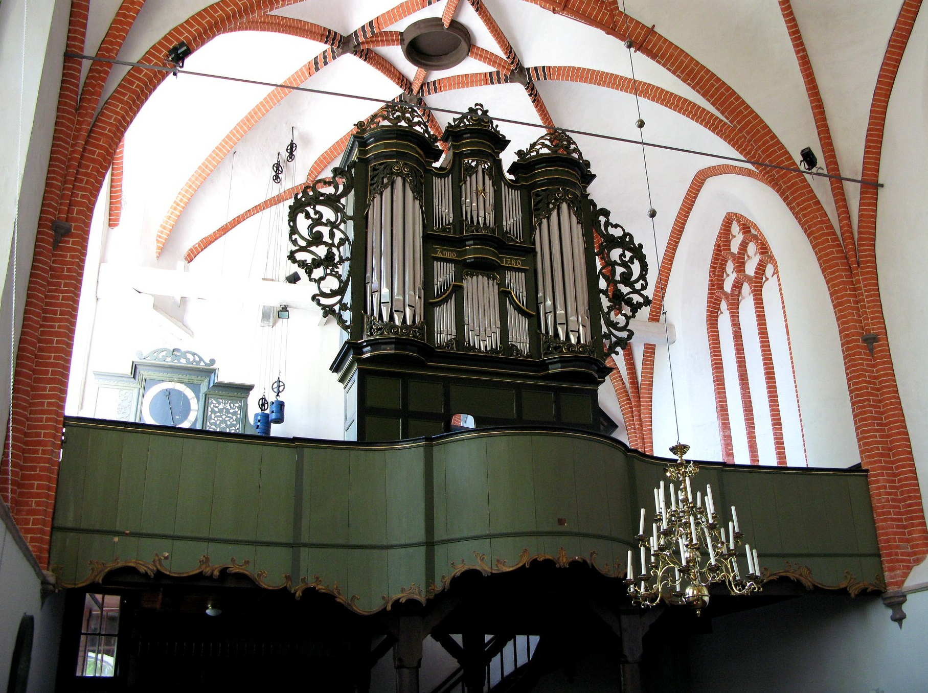 Orgel in Hinte, Landkreis Aurich